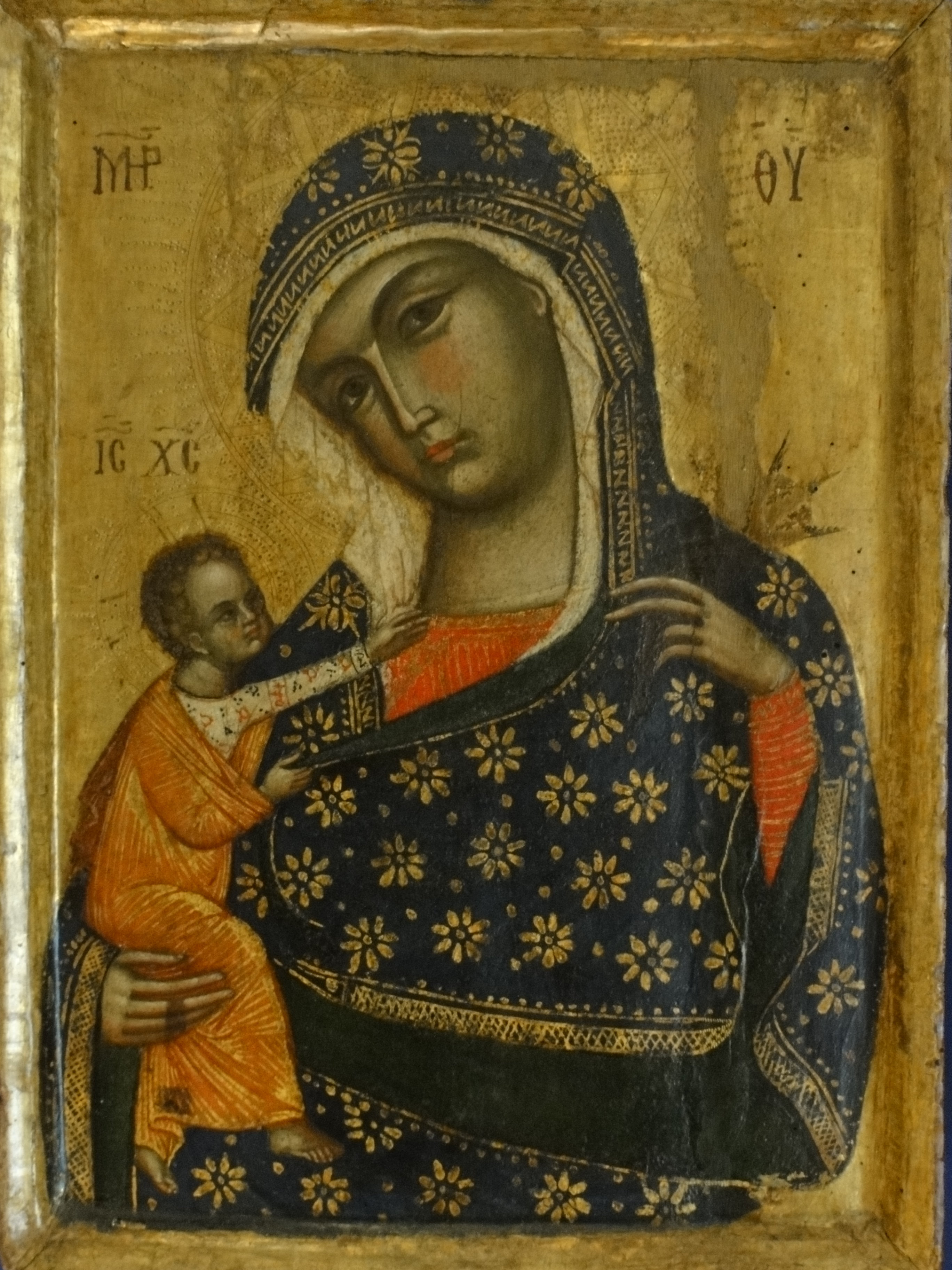 Assisi, Museo del Tesoro della Basilica di San Francesco, La Vergine con il Bambino (secondo quarto del XIV sec.), tempera su tavola del Maestro del dittico Sterbini.